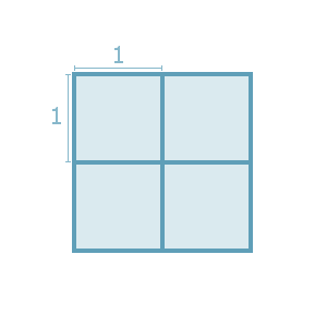 Schéma de la superficie d'un carré